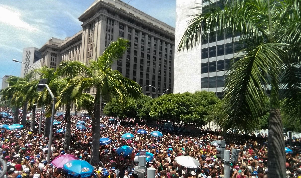 Monobloco